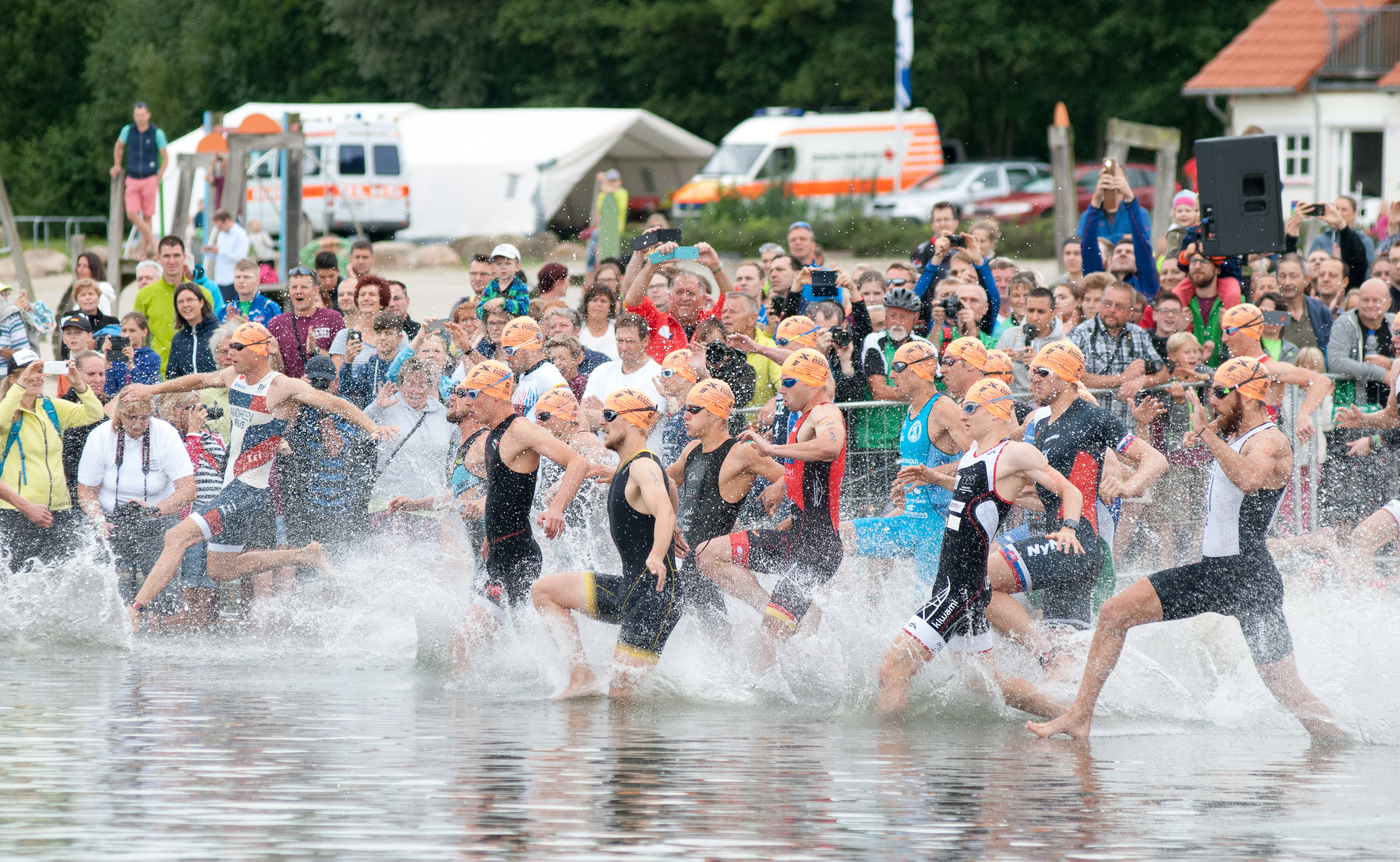 Start der O-See Challenge 2017